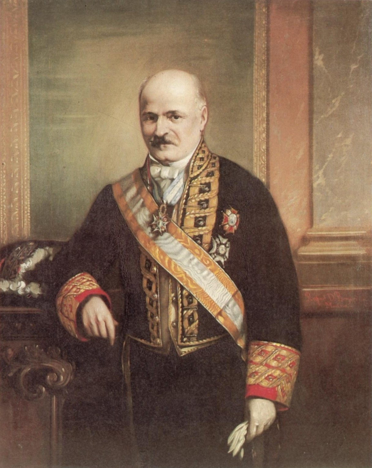 Retrato de Victorio Fernández Lascoiti Fourquet (1810-1878). Gobernador del Banco de España de abril de 1866 a julio de 1866